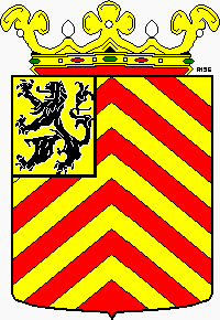 Gemeentewapen Langedijk